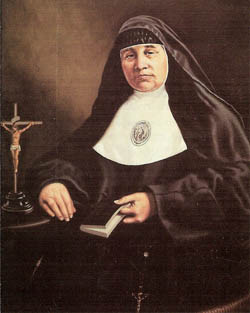 Madre Francisca Pacual